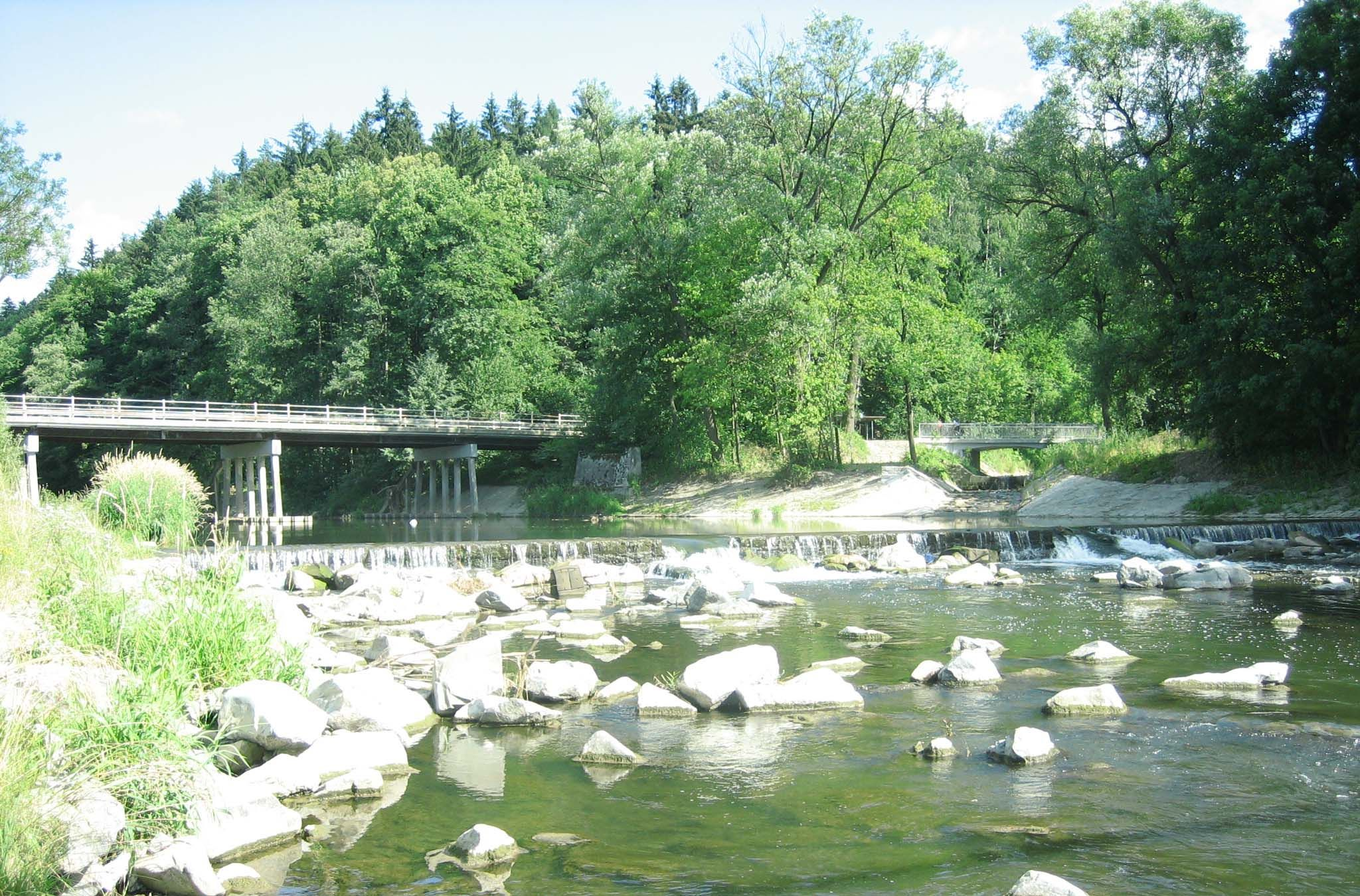 Vsetínská Bečva splávek pod ústím Semetínského potoka